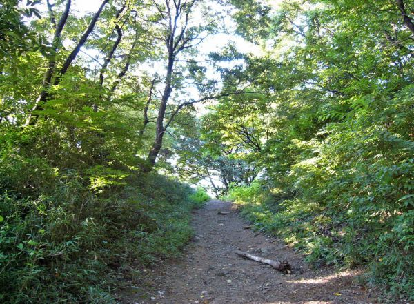 三ッ池公園。神奈川県横浜市鶴見区。2007年7月24日、投稿者が撮影。